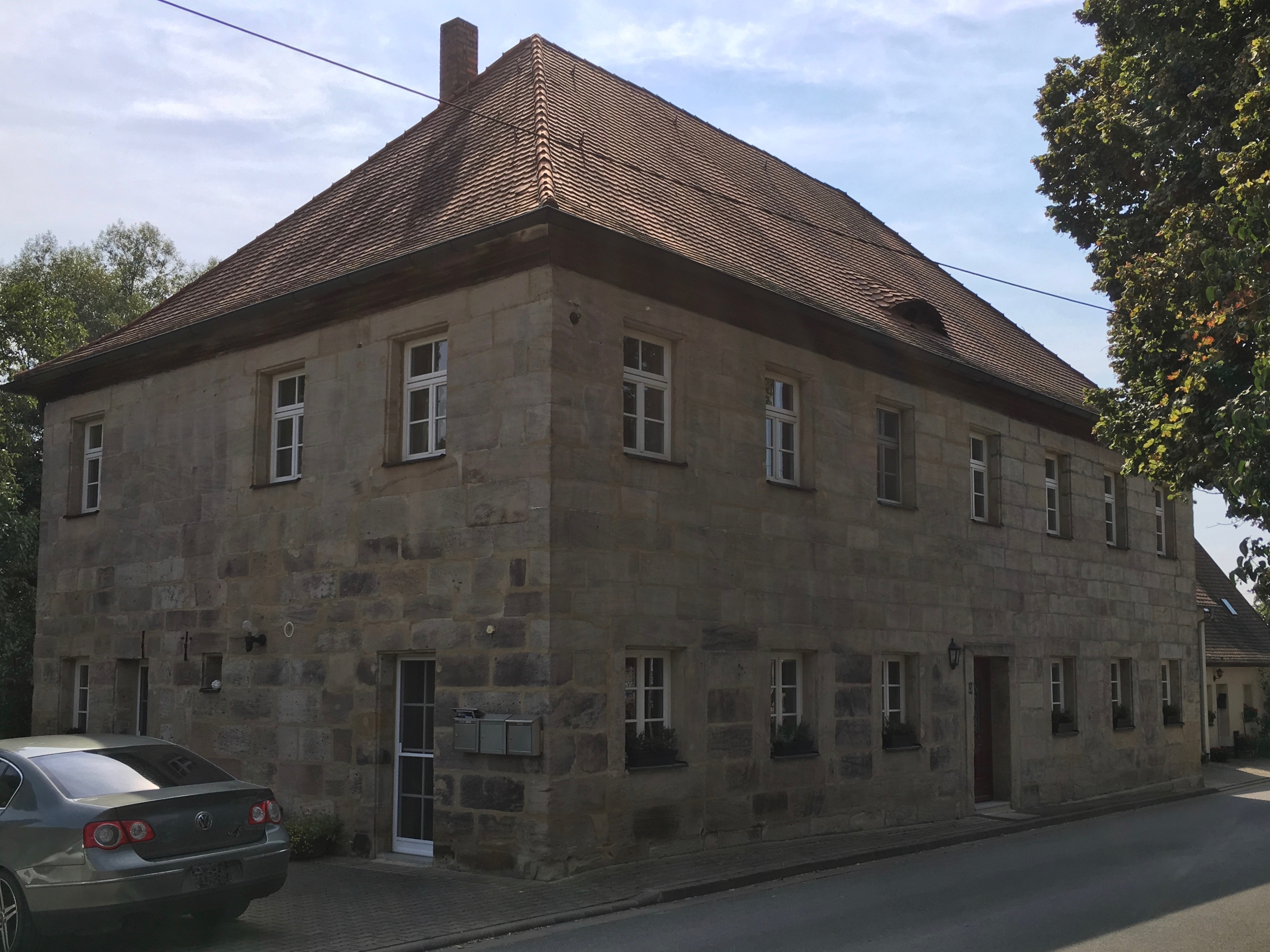 Oberndorf Nummer 5